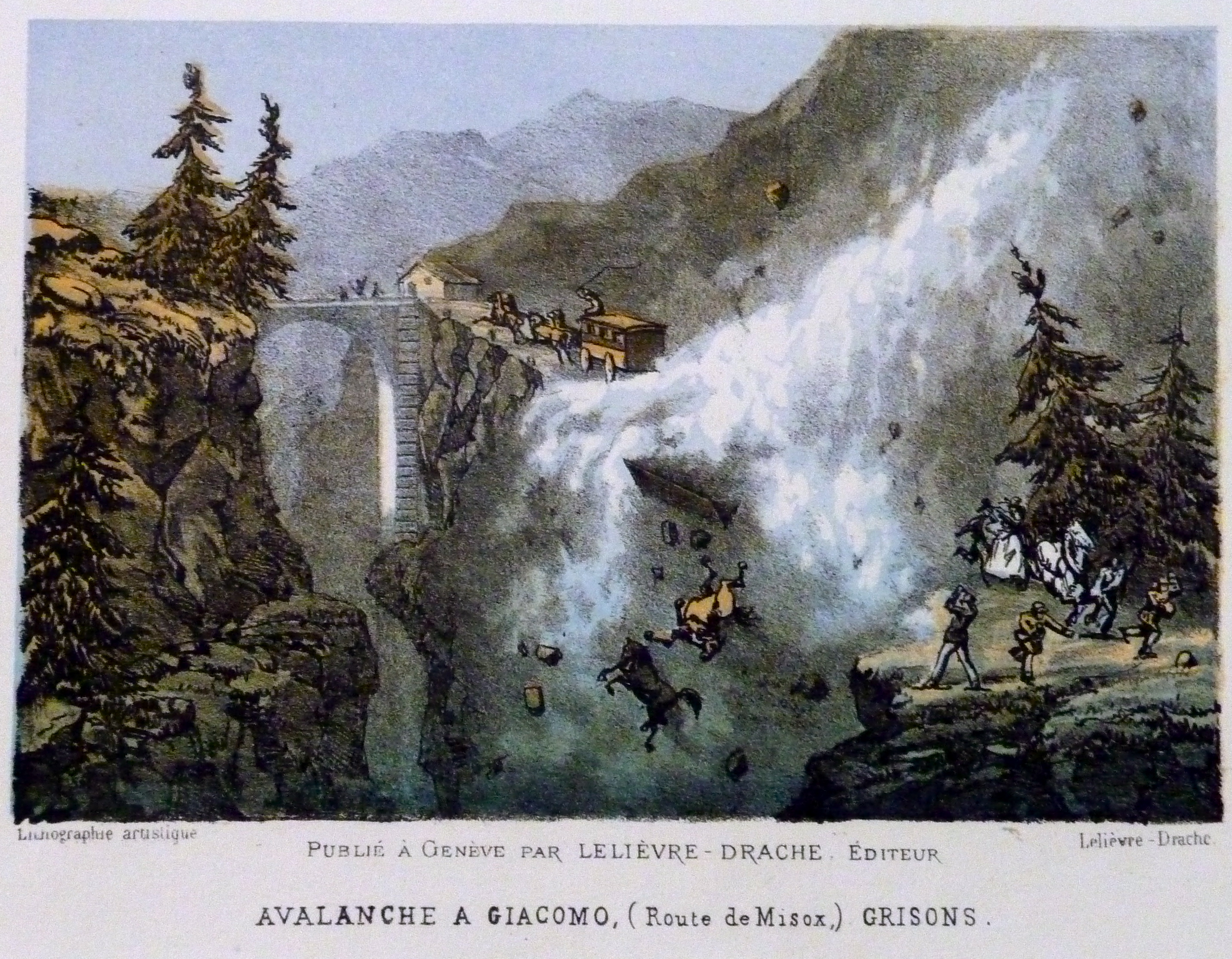 Unglück bei der Brücke Vittorio Emanuele am San Bernardinopass